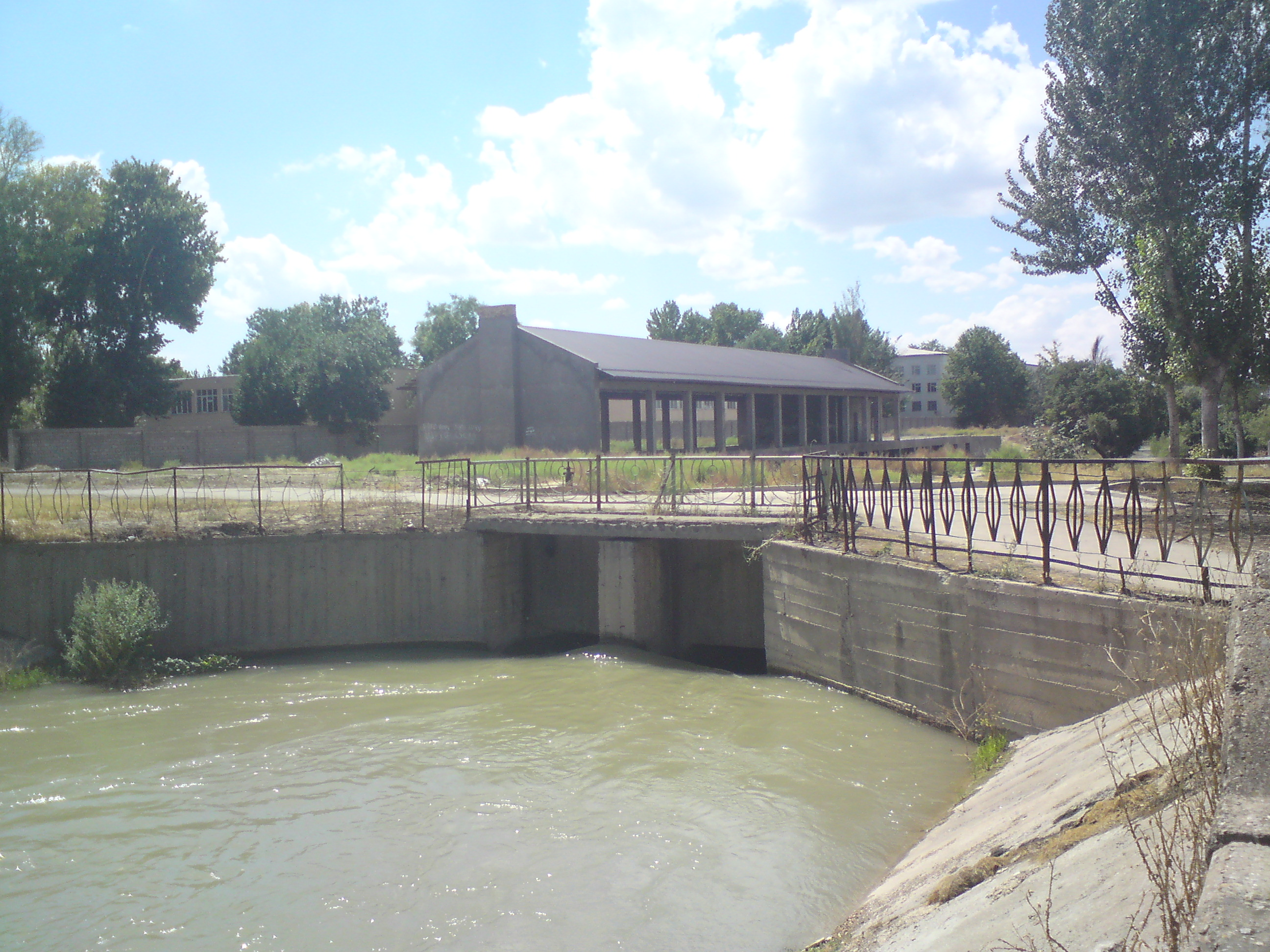 Точка отхода канала Дамарык от канала Каракамыш. Дамарык продолжается прямо, Каракамыш уходит вбок, образуя подземный участок